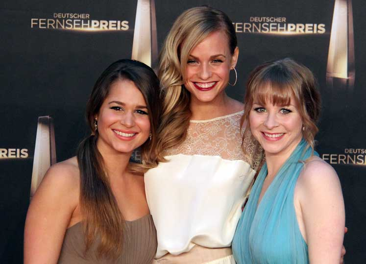 Cristina do Rego, Mirjam Weichselbraun und Jasmin Schwiers beim Deutschen Fernsehpreis 2012